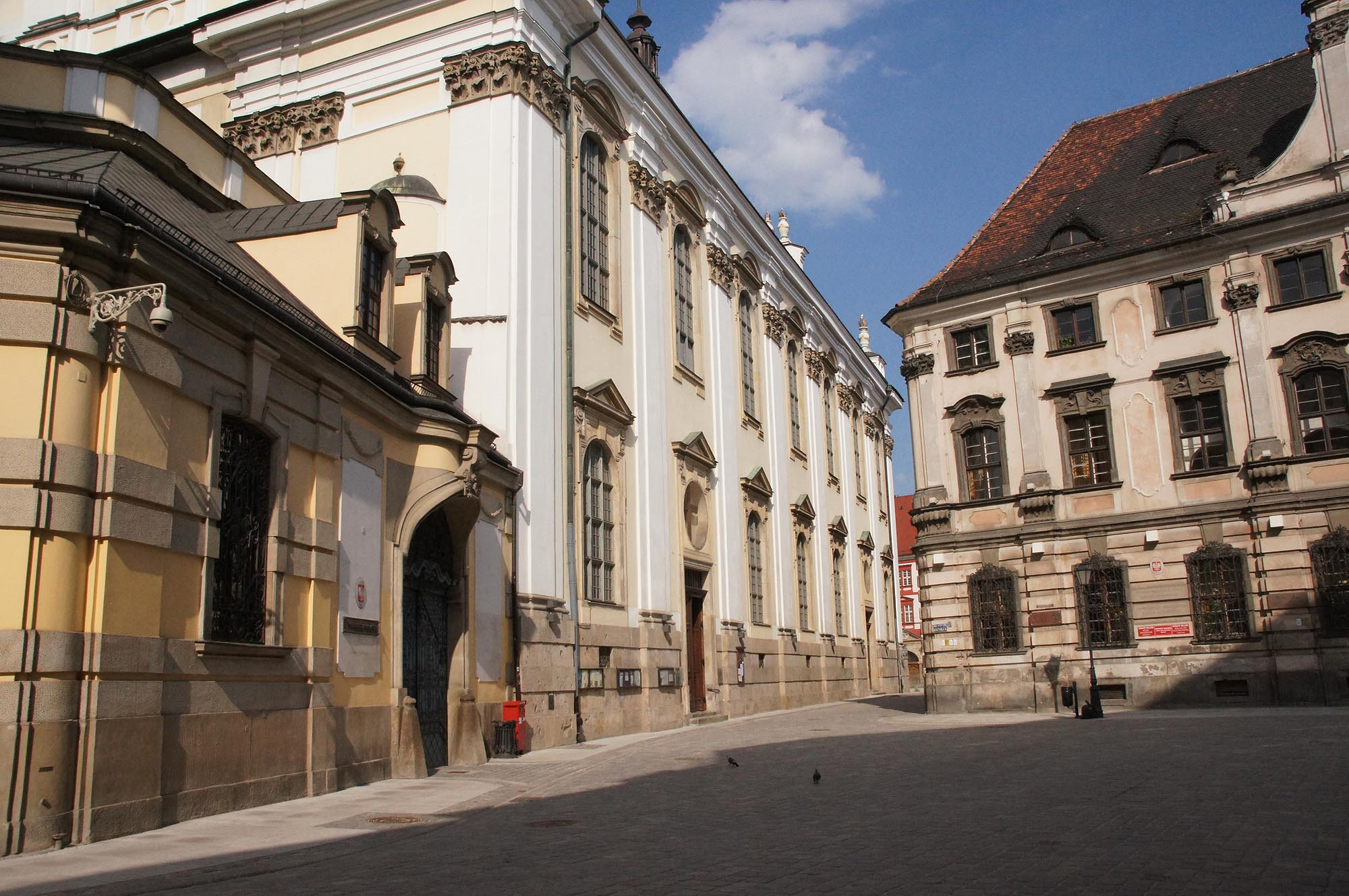 Wrocław, kościół klasztorny jezuitów p.w. Imienia Jezus, 1689-1698, 1722-1734